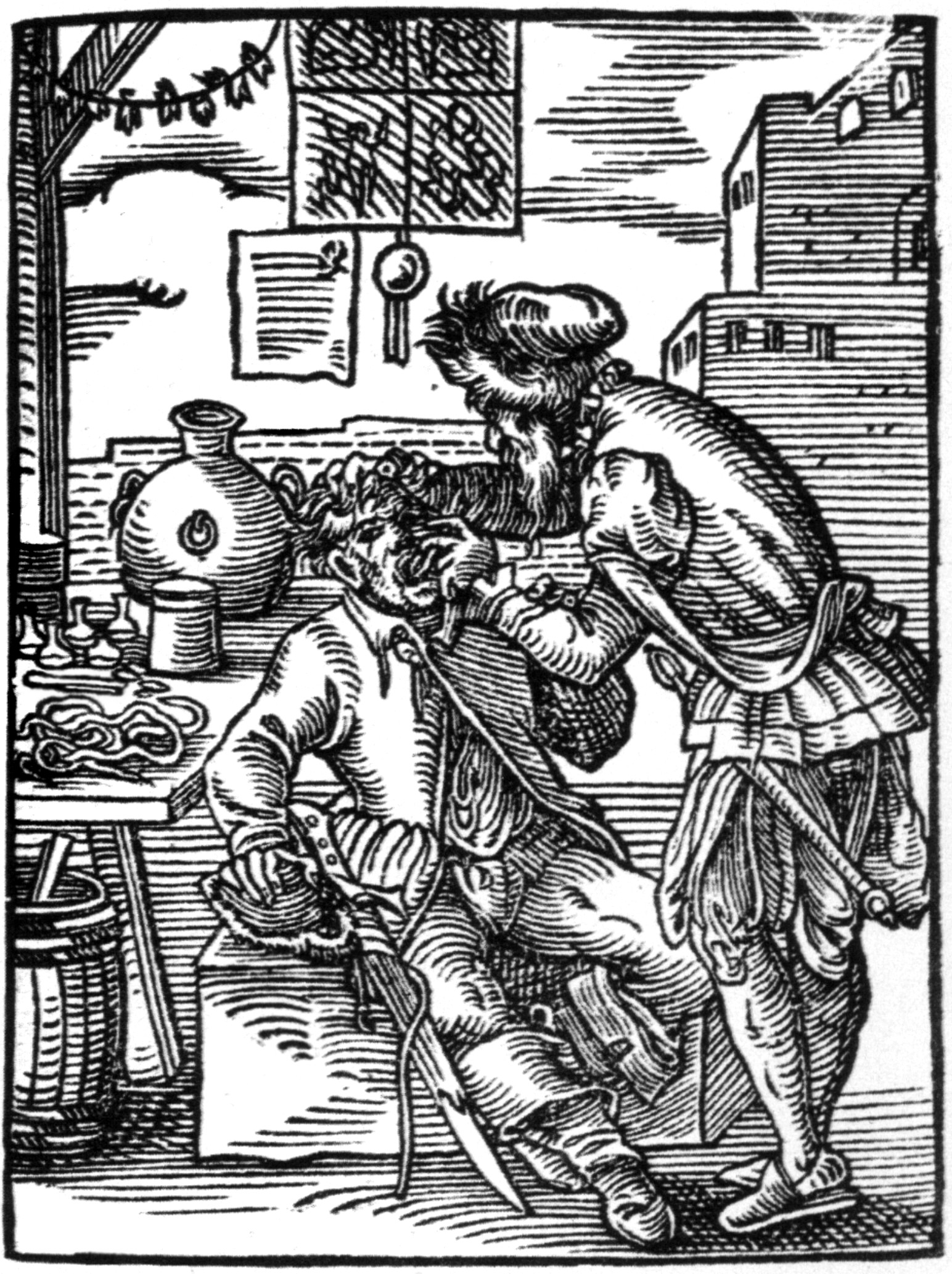 Desenho do século XVI, representando um barbeiro-dentista.